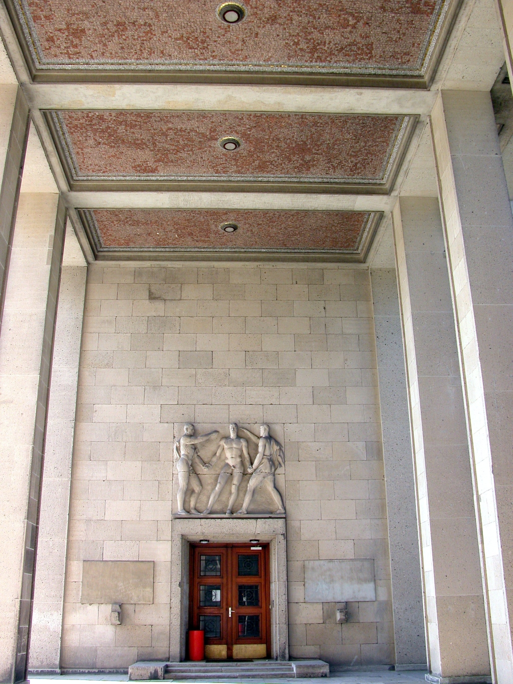 Braunschweig: „Akademie für Jugendführung“, Eingangsbereich. Brunswick, Germany: “Akademie für Jugendführung”, entrance area.